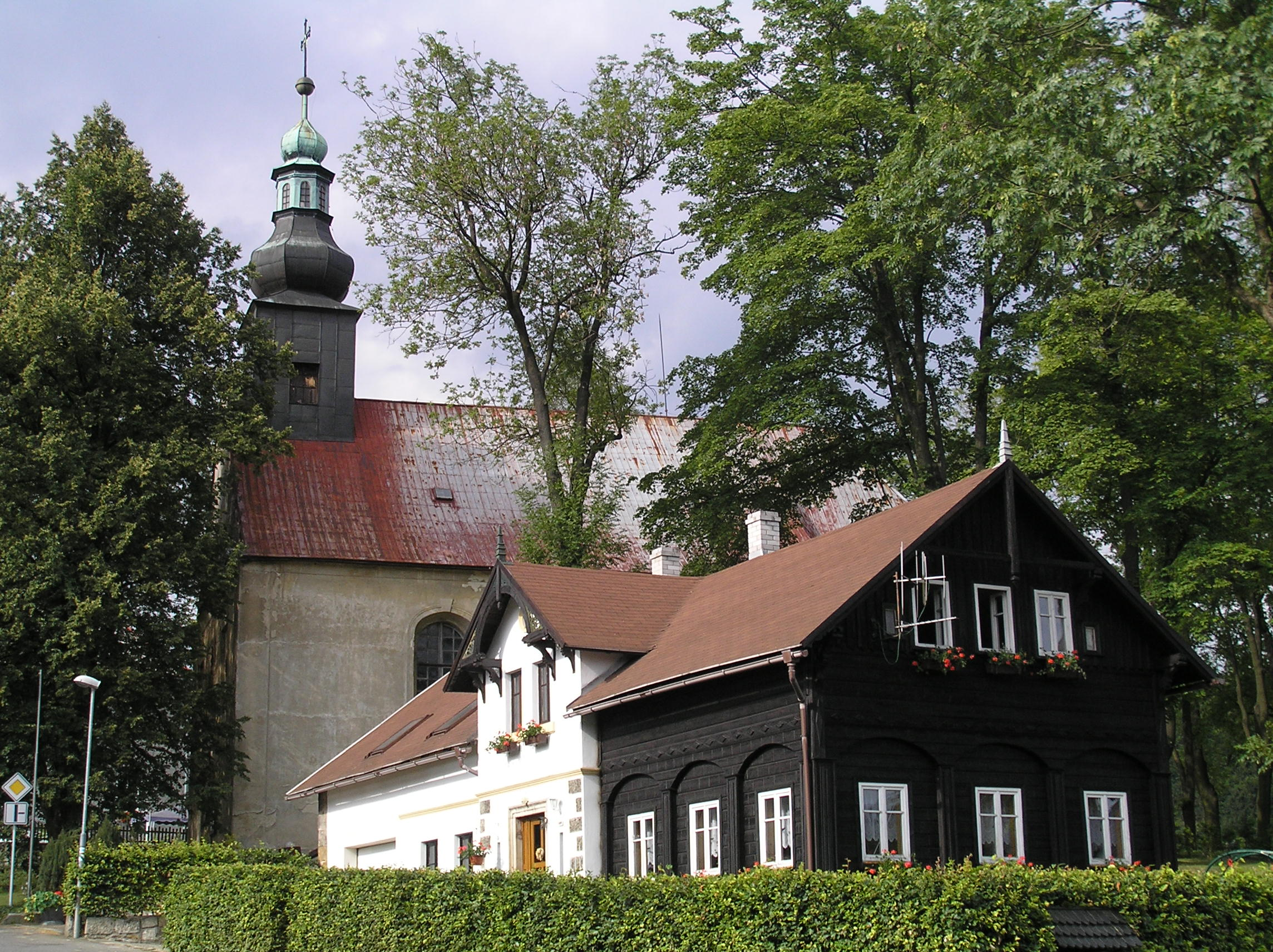 Kostel Nejsvětější Trojice, v obci, Petrovice (Jablonné v Podještědí).